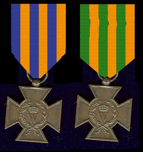 EIGN SCAN , GETEKENDE LINTEN IN DE CORRECTE KLEUREN